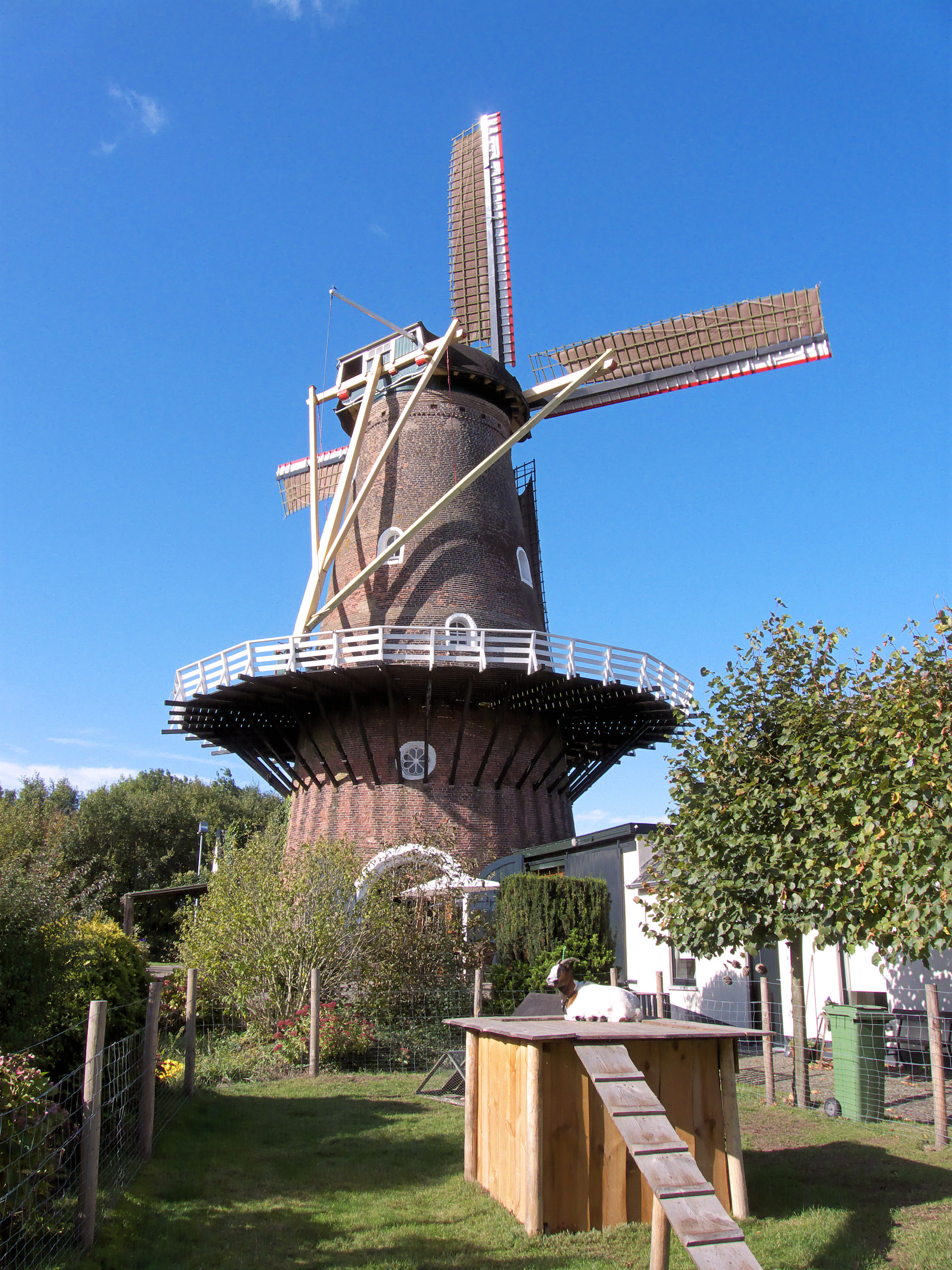 Emmamolen, Nieuwkuijk, Netherlands